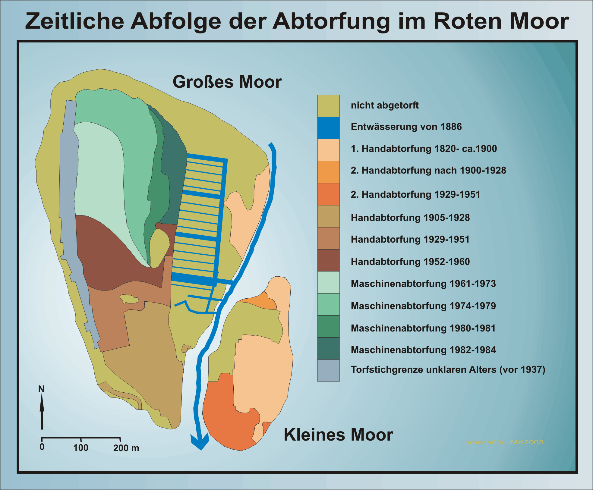 Zeitliche Abfolge der Abtorfung im Roden Moor, Hochrhön